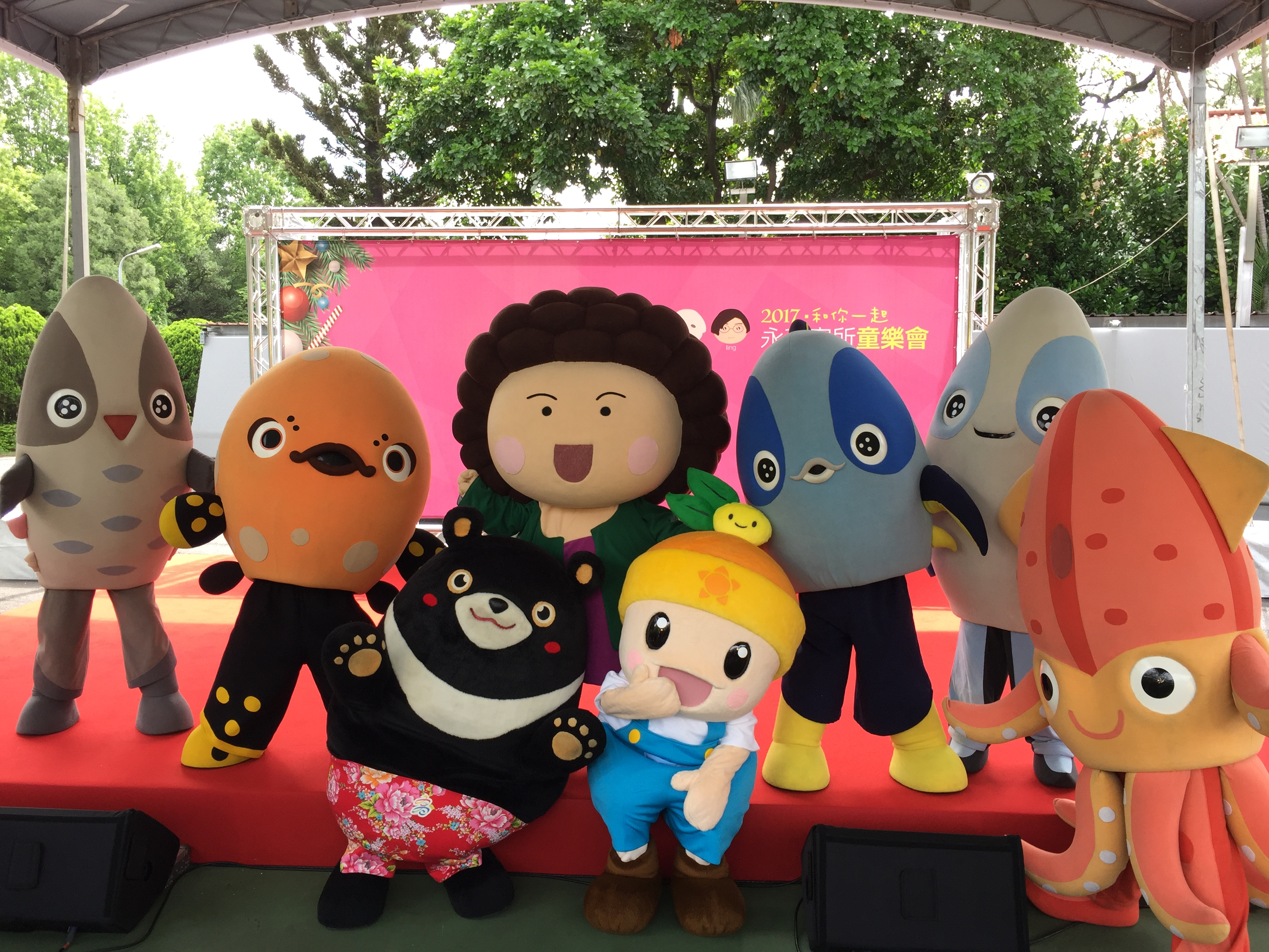 中文（台灣）: 中華民國總統官邸「2017和你一起永和寓所童樂會」，邀請到曾在全國吉祥物PK戰中有傑出表現的世大運吉祥物熊讚、桃園吉祥物ㄚ桃、園哥，以及高雄吉祥物高通通、高雄熊、花媽與海洋五寶